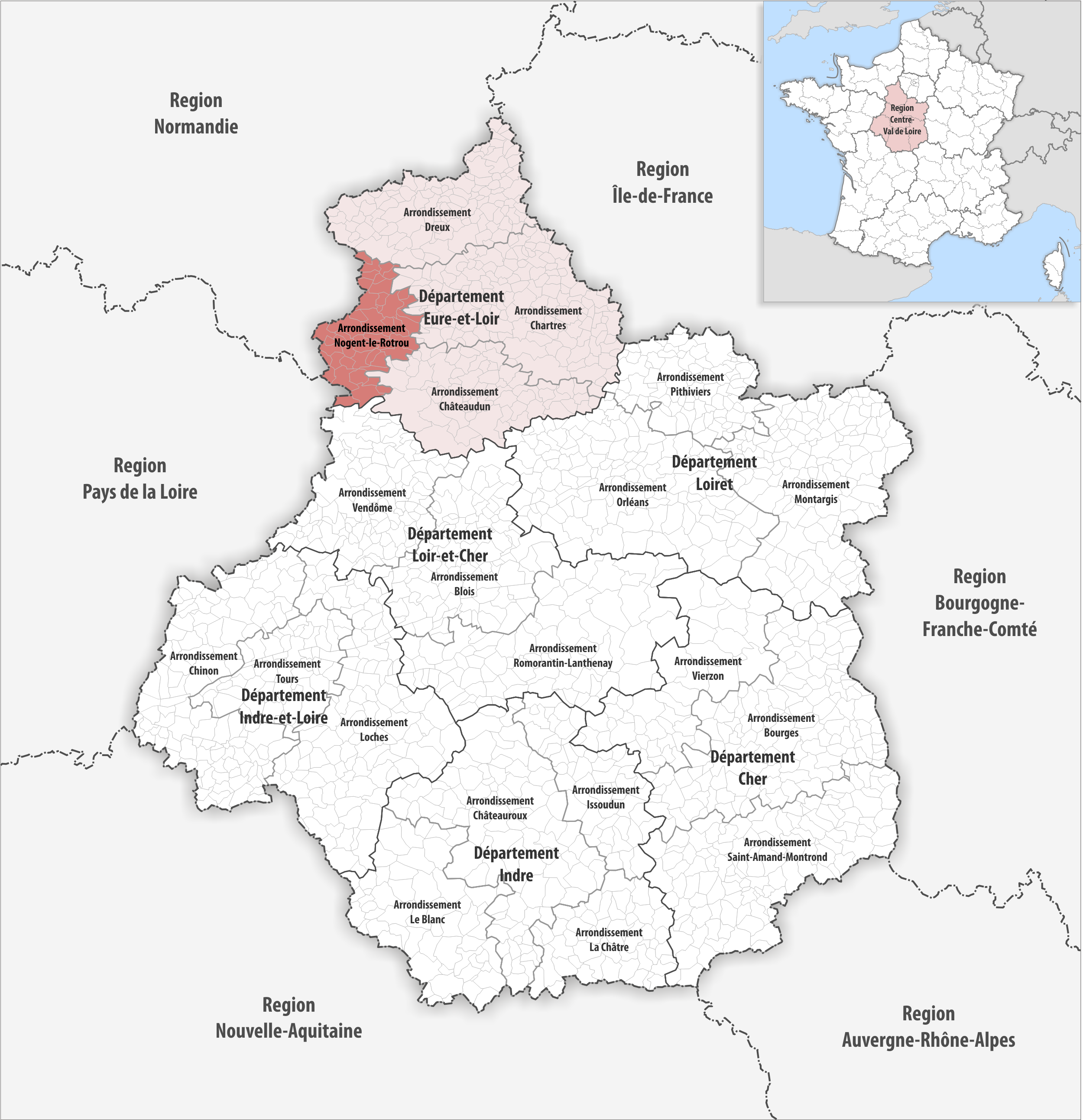 Lage des Arrondissements Nogent-le-Rotrou